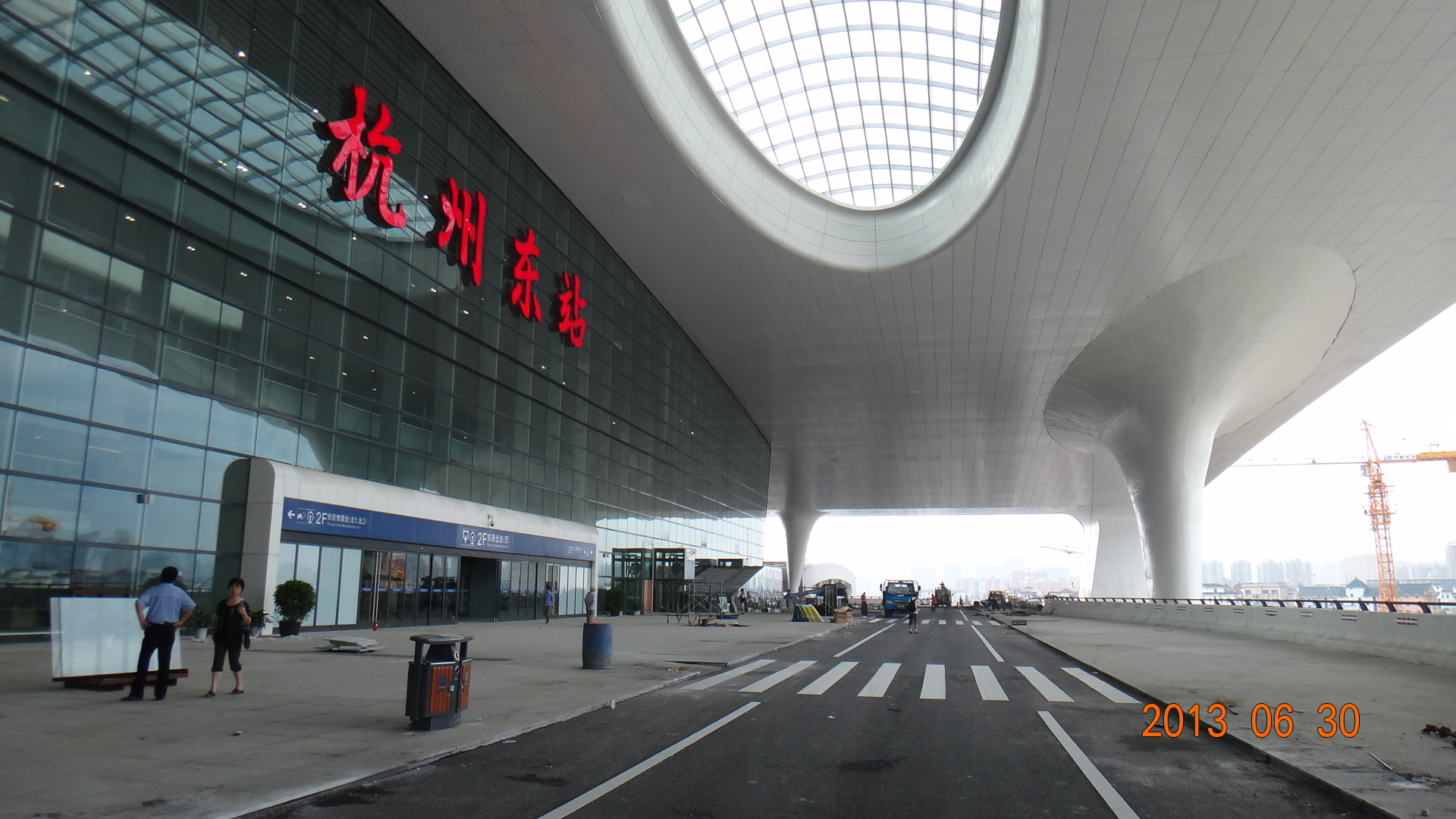 杭州.火车东站（北大门.候车层-地上2层）